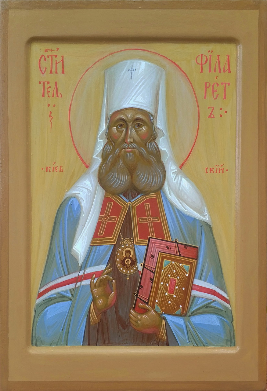 Святитель Филарет Киевский. Икона, Преображенский В., Киев, 2018